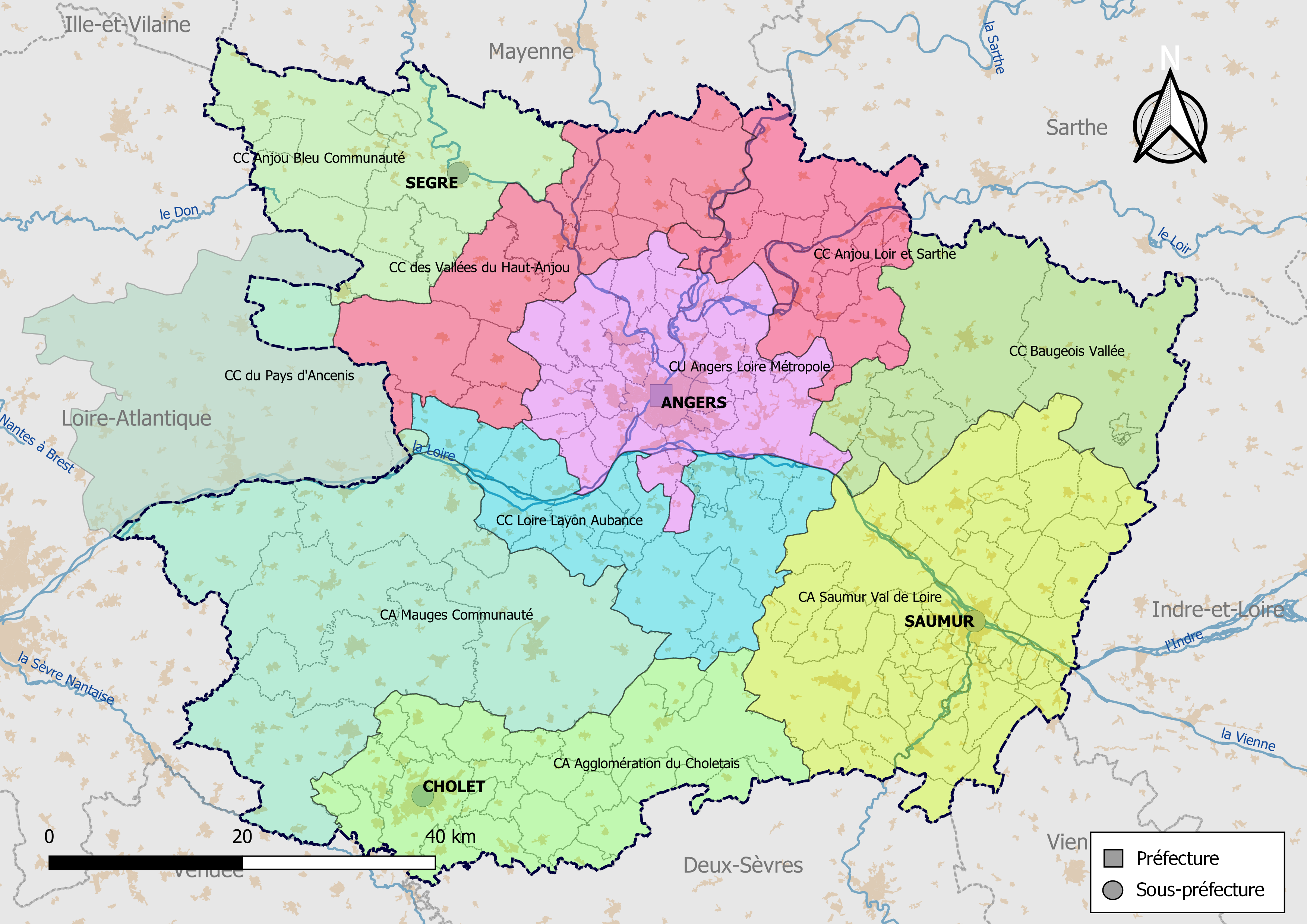 Carte des intercommunalités du département de Maine-et-Loire, France. Composition au 1er janvier 2019.